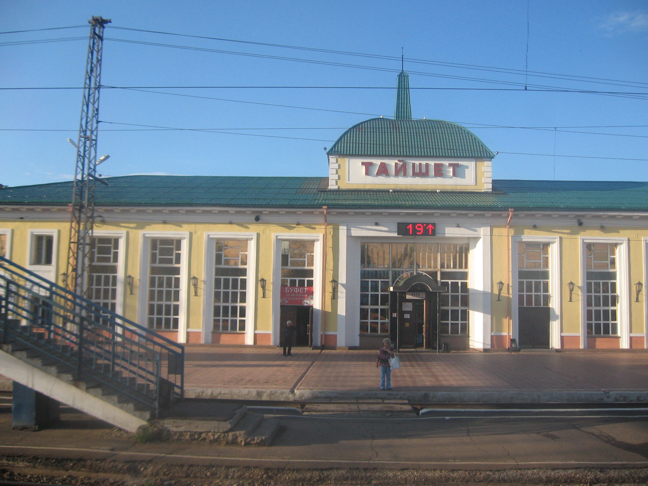 Вид с перрона